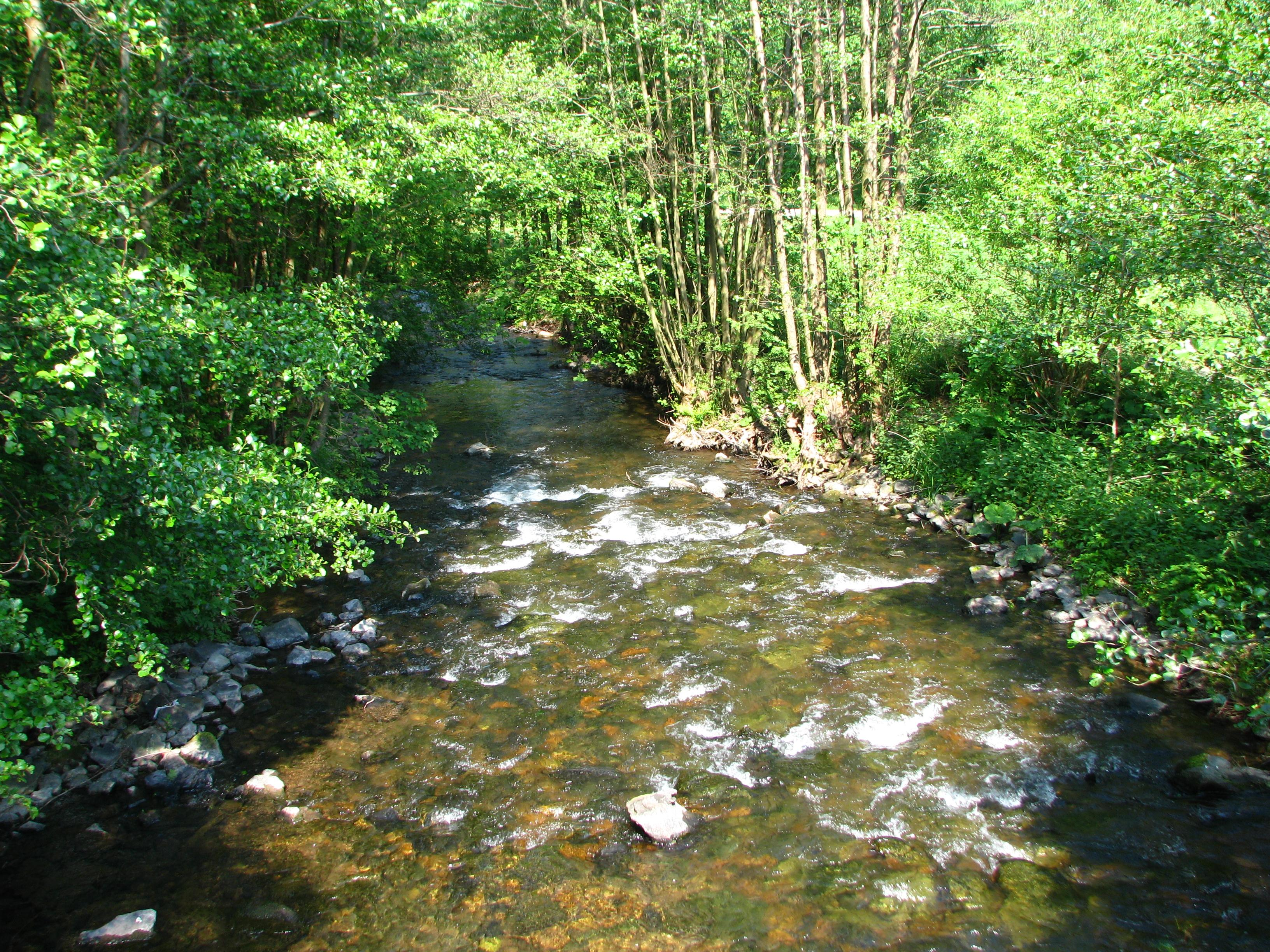 Apfelstädt im Bereich der Hammerwand zwischen Tambach-Dietharz und Georgenthal.